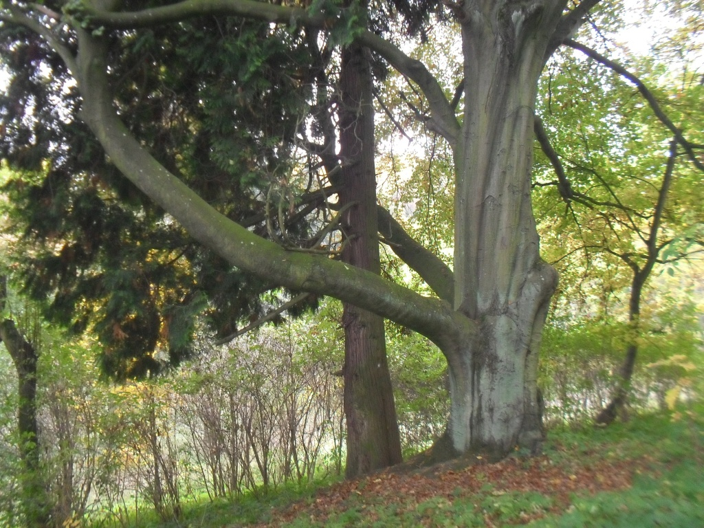 Buk zwyczajny i żywotnik olbrzymi w parku w Laskowicach. Obwód buka 390 cm a żywotnika 221 cm. Razem tworzą unikatowy twór przyrody.